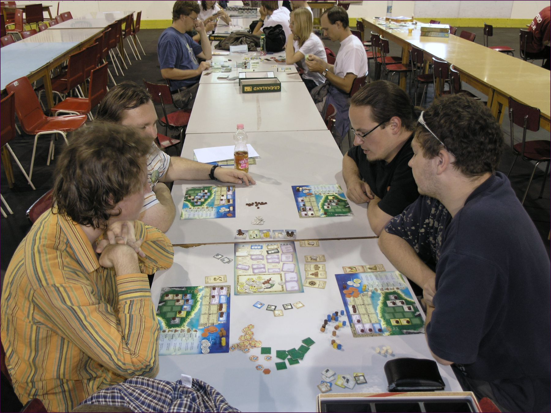 GameCon 2007 in Pardubice - Puerto Rico